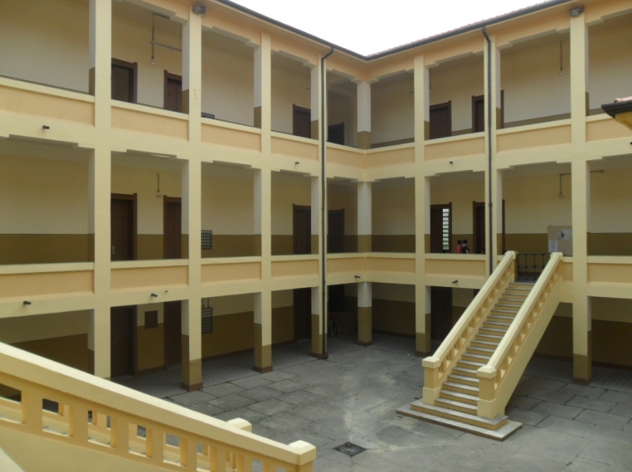 A escola passou por reformas expressivas em 2014, mas não teve as características originais afetadas. A imagem faz parte do site da empresa responsável pela reforma, a Código Engenharia.